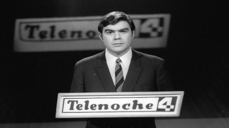 Carlos Giacosa en su primera edición de Telenoche 4, año 1968